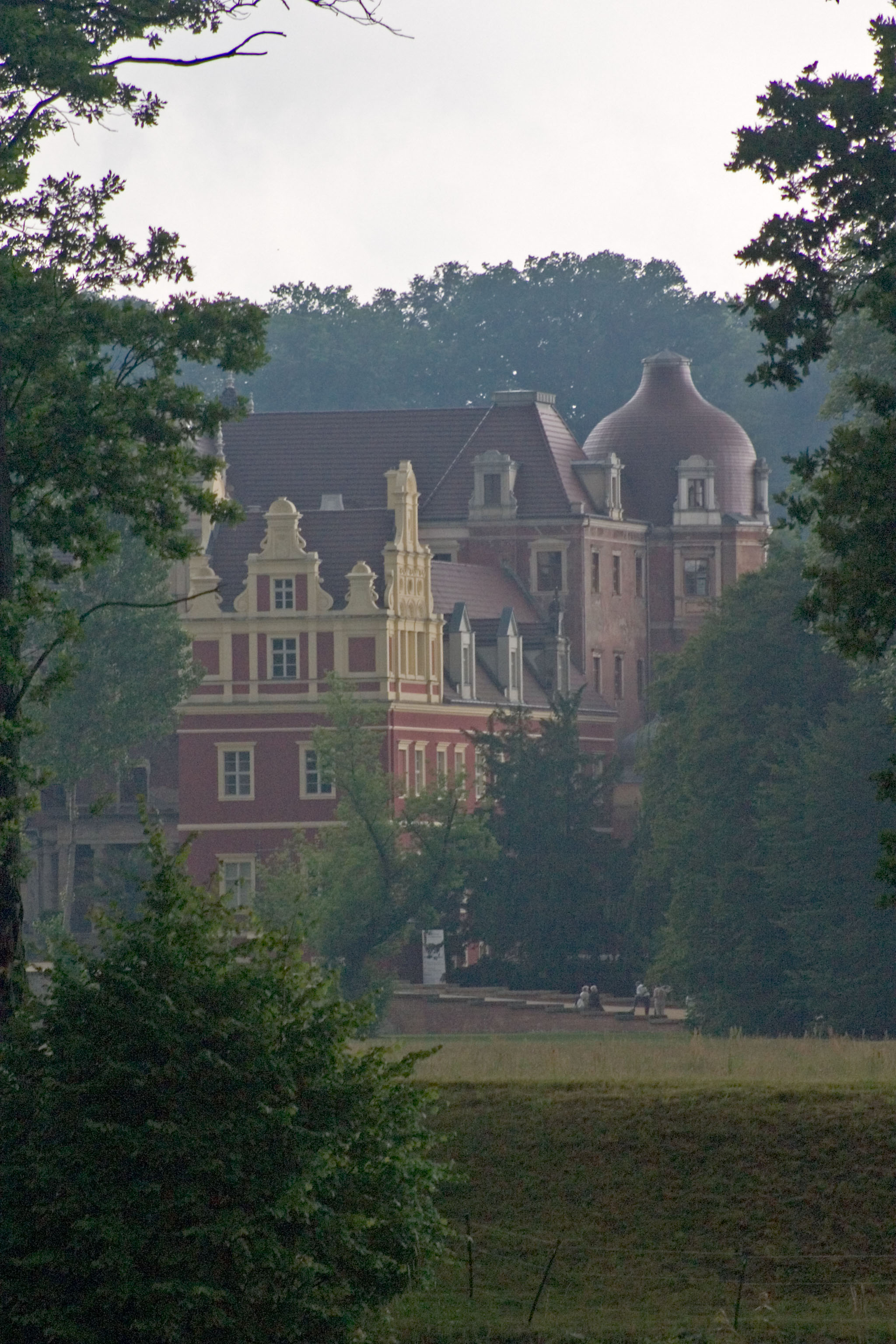 Fürst-Pückler-Park (Park Mużakowski) Author: Adam Kumiszcza